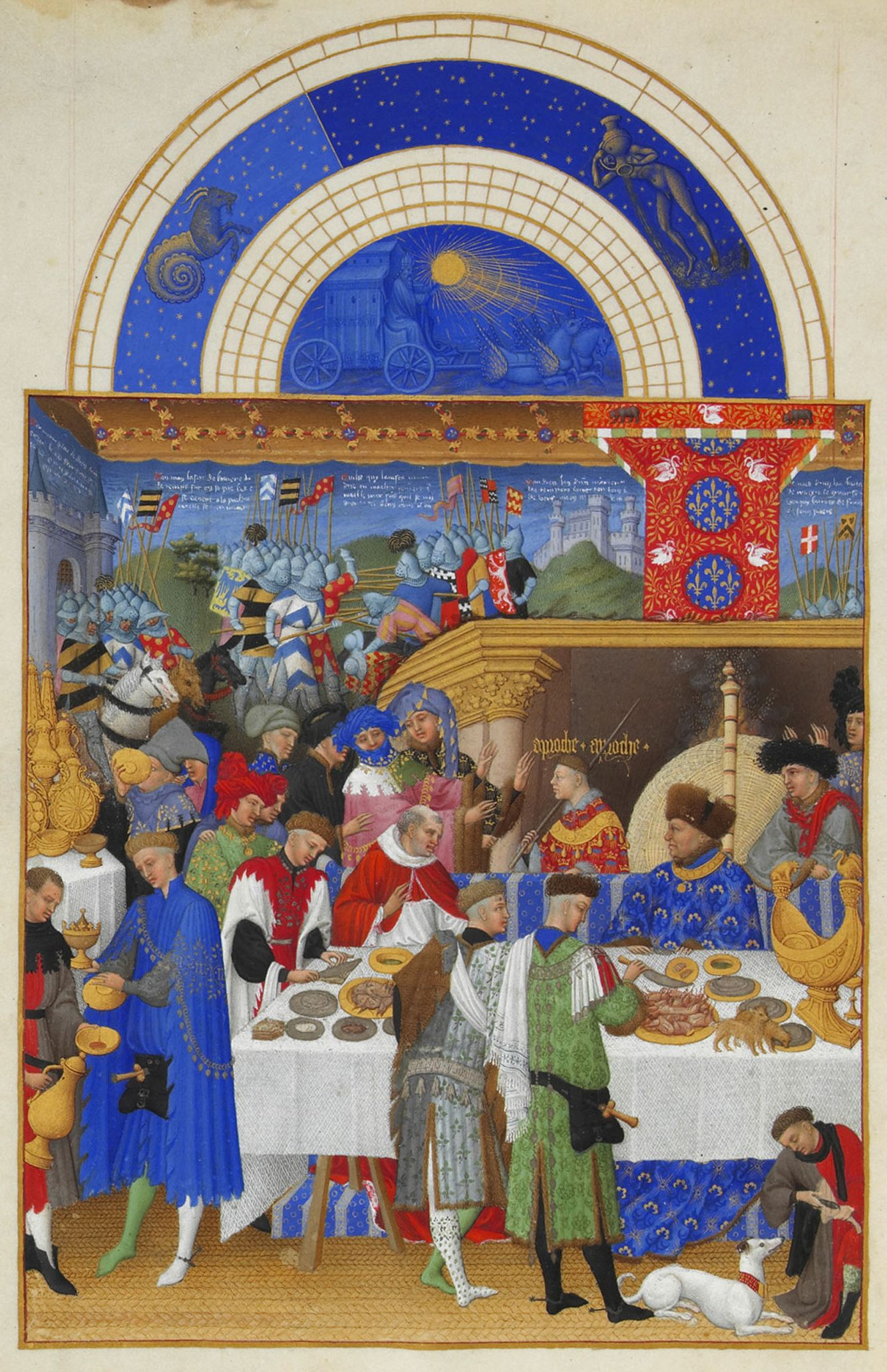 Le duc de Berry, assis en bas à droite, dos au feu, est habillé de bleu et coiffé d'un bonnet de fourrure. Il invite ses gens et ses proches à se présenter à lui. Derrière lui figure l'inscription « Approche Approche ». Plusieurs familiers du duc s'approchent de lui pendant que des serviteurs s'affairent : les échansons servent à boire, deux écuyers tranchants au centre sont vus de dos ; au bout de la table officie un panetier. Au-dessus de la cheminée figurent les armes du duc, « d'azur semé de fleurs de lys d'or, à la bordure engrêlée de gueules », avec de petits ours et des cygnes blessés. Plusieurs animaux de compagnie sont représentés : petits chiens sur la table, lévrier au sol. La tapisserie du fond de la salle semble représenter des épisodes de la guerre de Troie